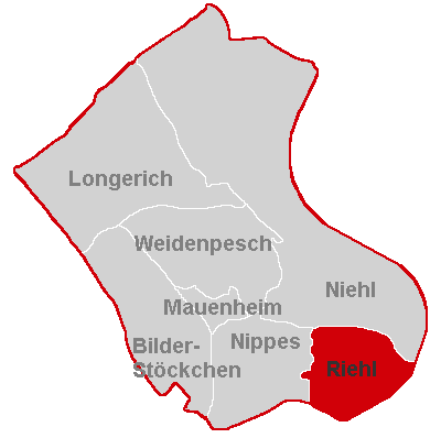 Lagekarte Riehl im Stadtbezirk Köln-Nippes